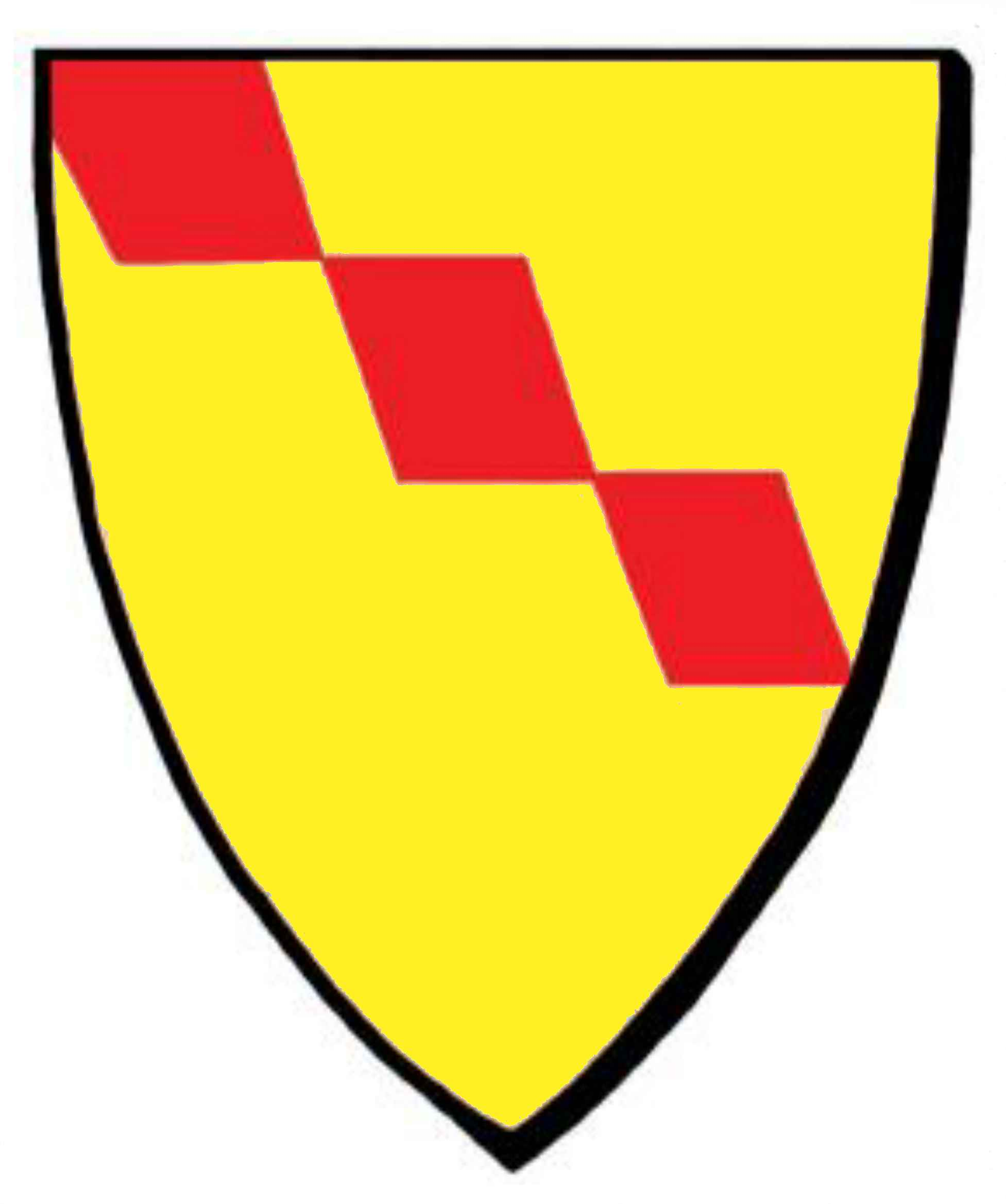 Wappen von Bicken - Wolkersdorfer-Linie (1262-1398) und Westerwälder Linie (1328-1398)